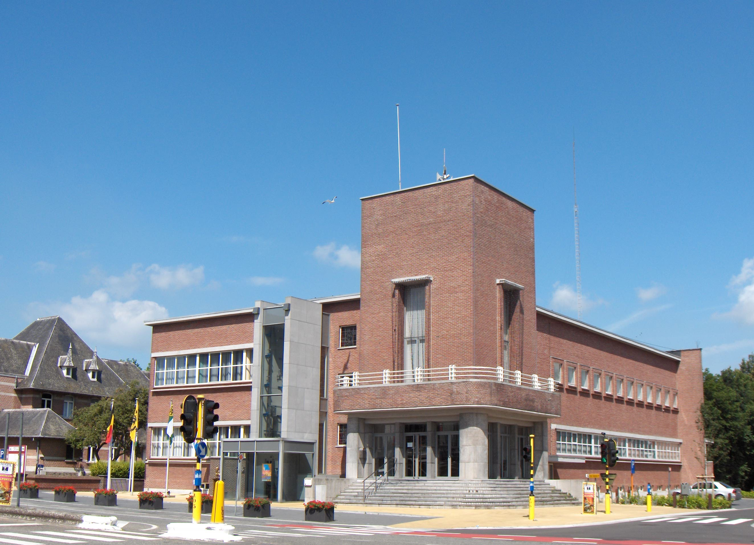 Zelzate (Belgien, Prov. Ostflandern), Rathaus, Architekt: G. Bontinck (1938).